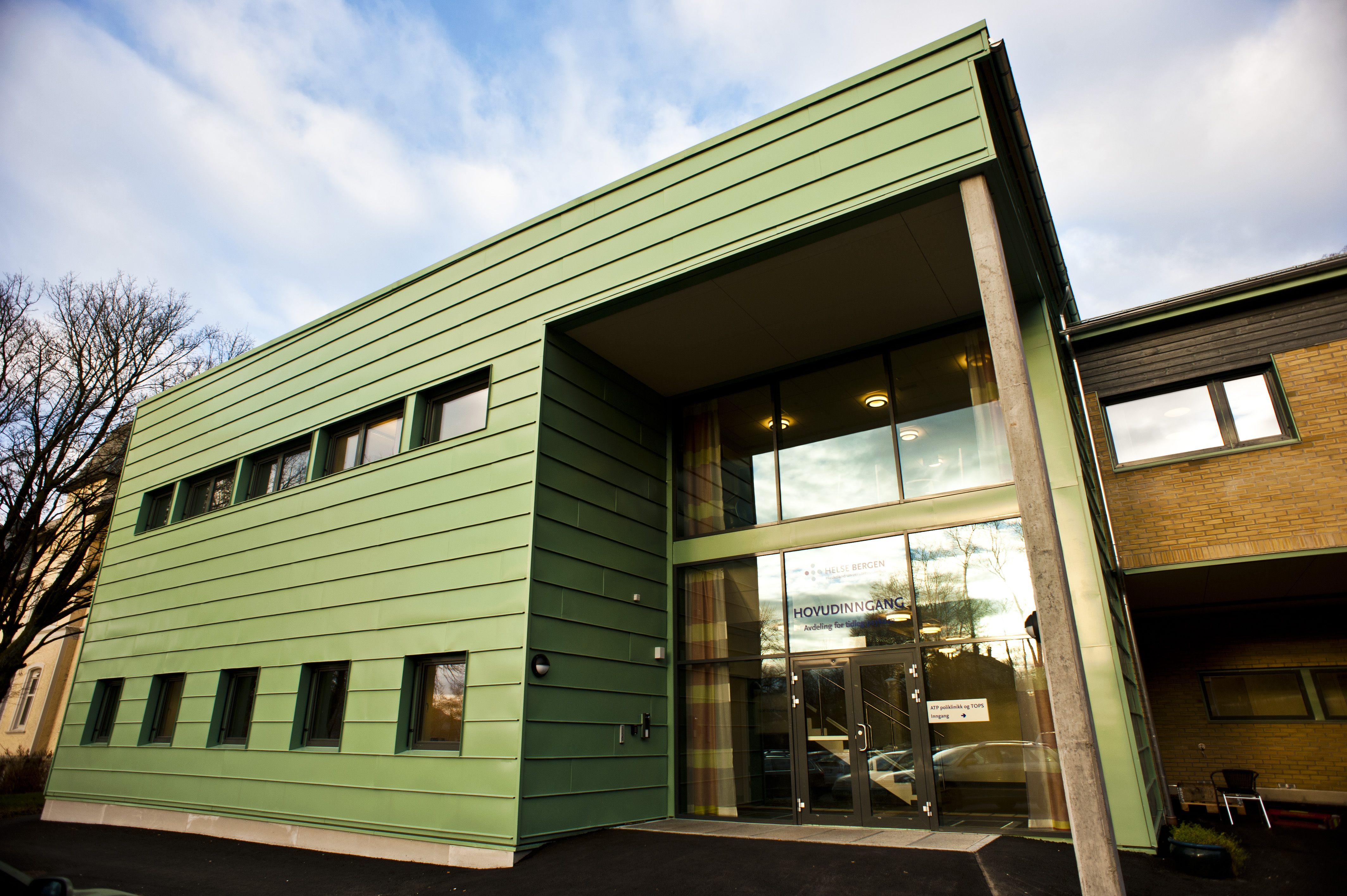 ved Psykiatrisk klinikk i Sandviken. Her inne er blant anna gymsal, sengepost og poliklinikk.